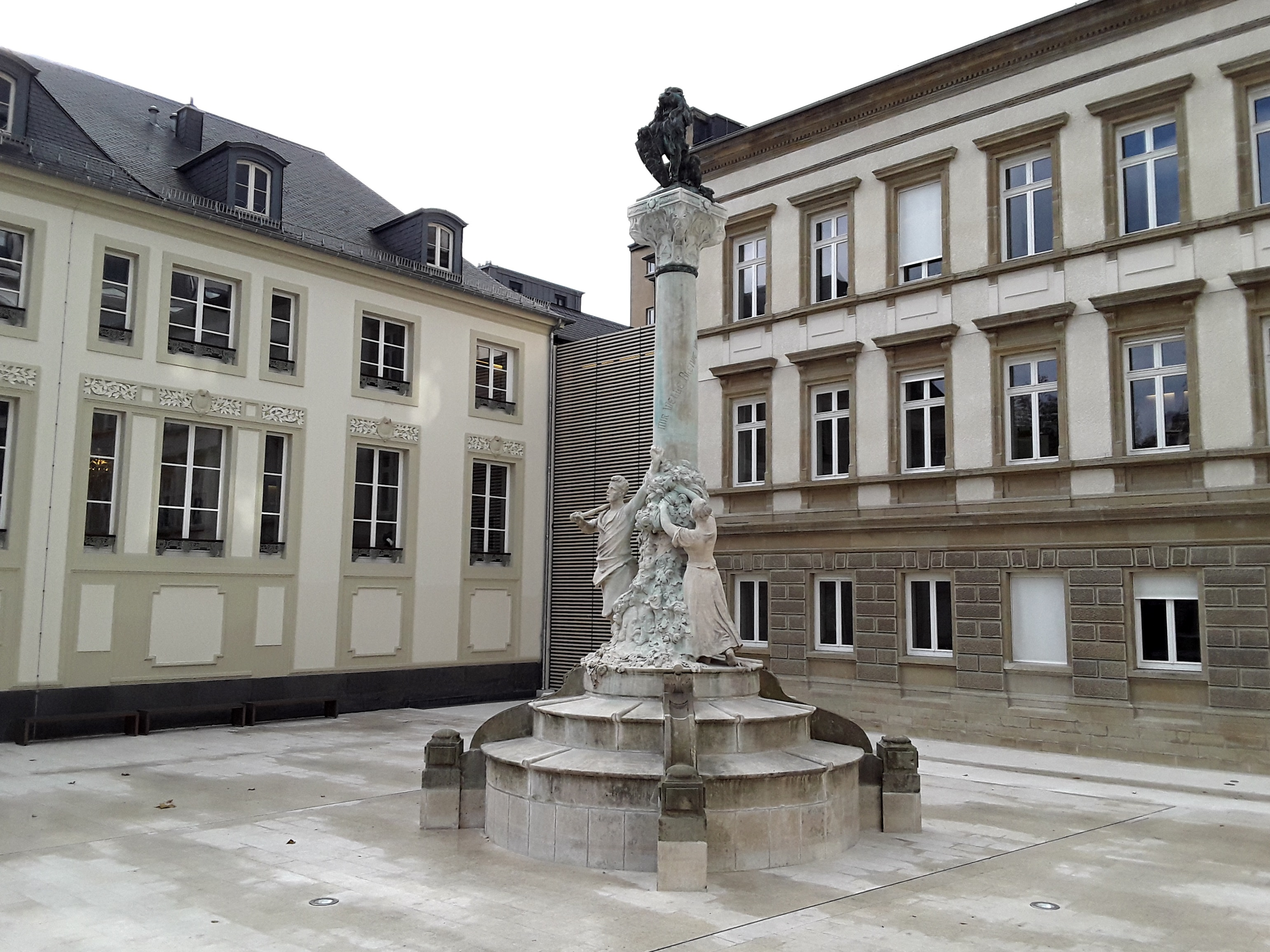 Luxembourg, square Jan-Pallach. Monument à la mémoire des deux poètes Edmond de la Fontaine (dit Dicks) et Michel Lentz après la rénovation de la place en 2016 (sans fontaine autour du monument).